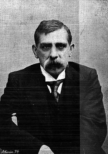 Retrato de Emilio Sala, obra del fotógrafo Kaulak, recogido en la revista española La Ilustración Española y Americana.